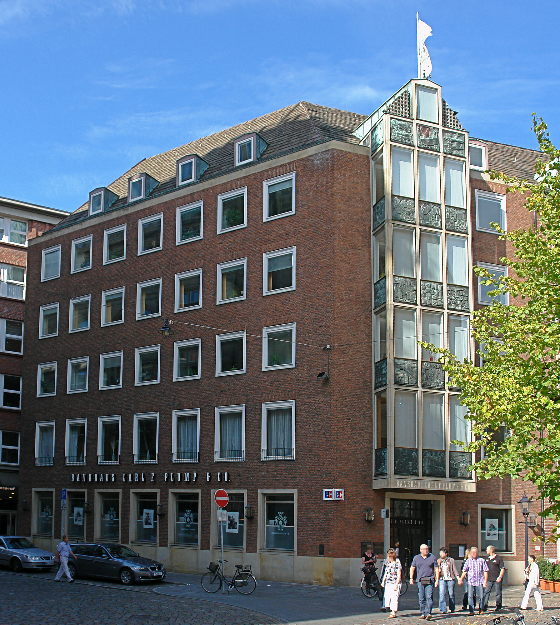 Bankhaus Carl F. Plump und Co. in Bremen, Am Markt 19.Das abgebildete Objekt ist ein geschütztes Kulturdenkmal in der Freien Hansestadt Bremen, mit der Nr. 0176 beim Landesamt für Denkmalpflege registriert.